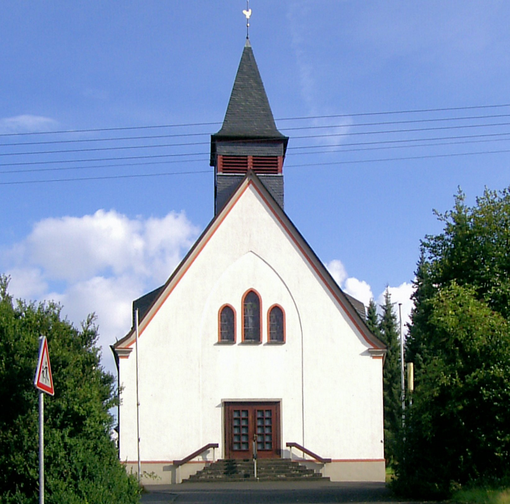 Kirche im Rother Ortsteil Oettershagen